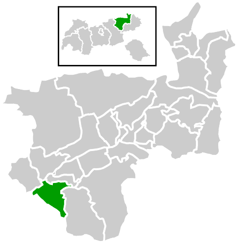 Lage der Gemeinde innerhalb des Bezirks Kufstein